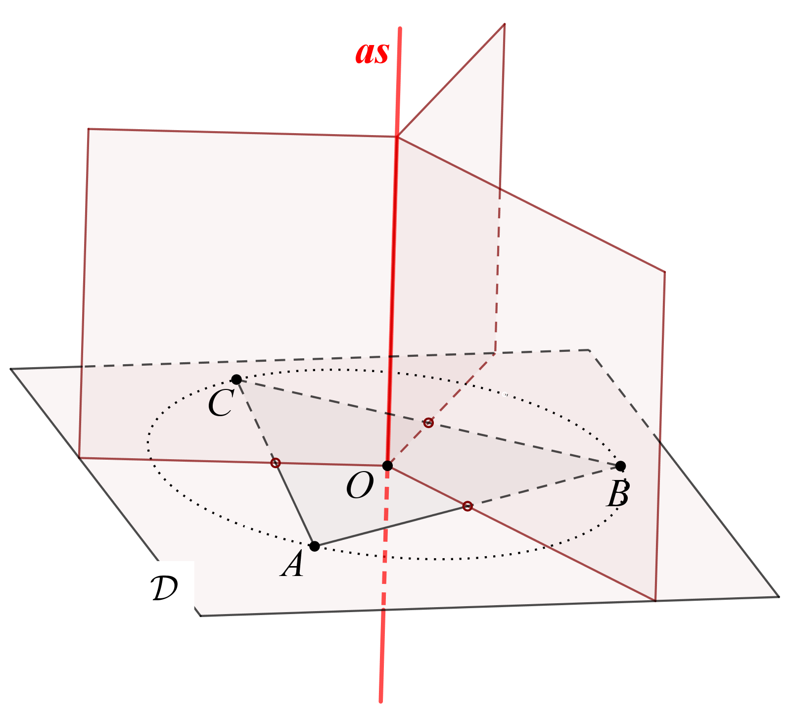 definitie van de as d.m.v. drie middelloodvlakken